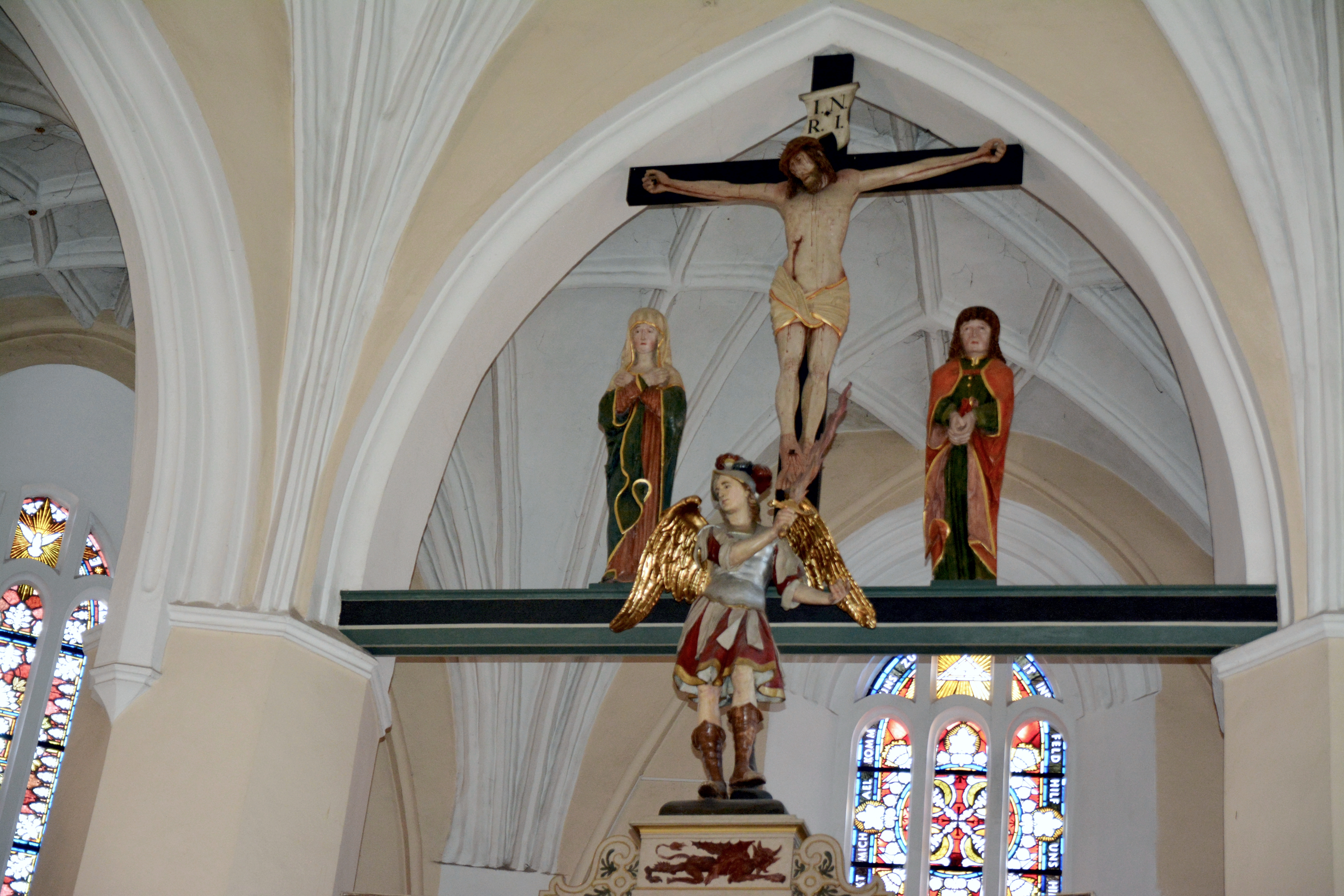 Kościół p.w. św. Michała Archanioła w Świebodzinie